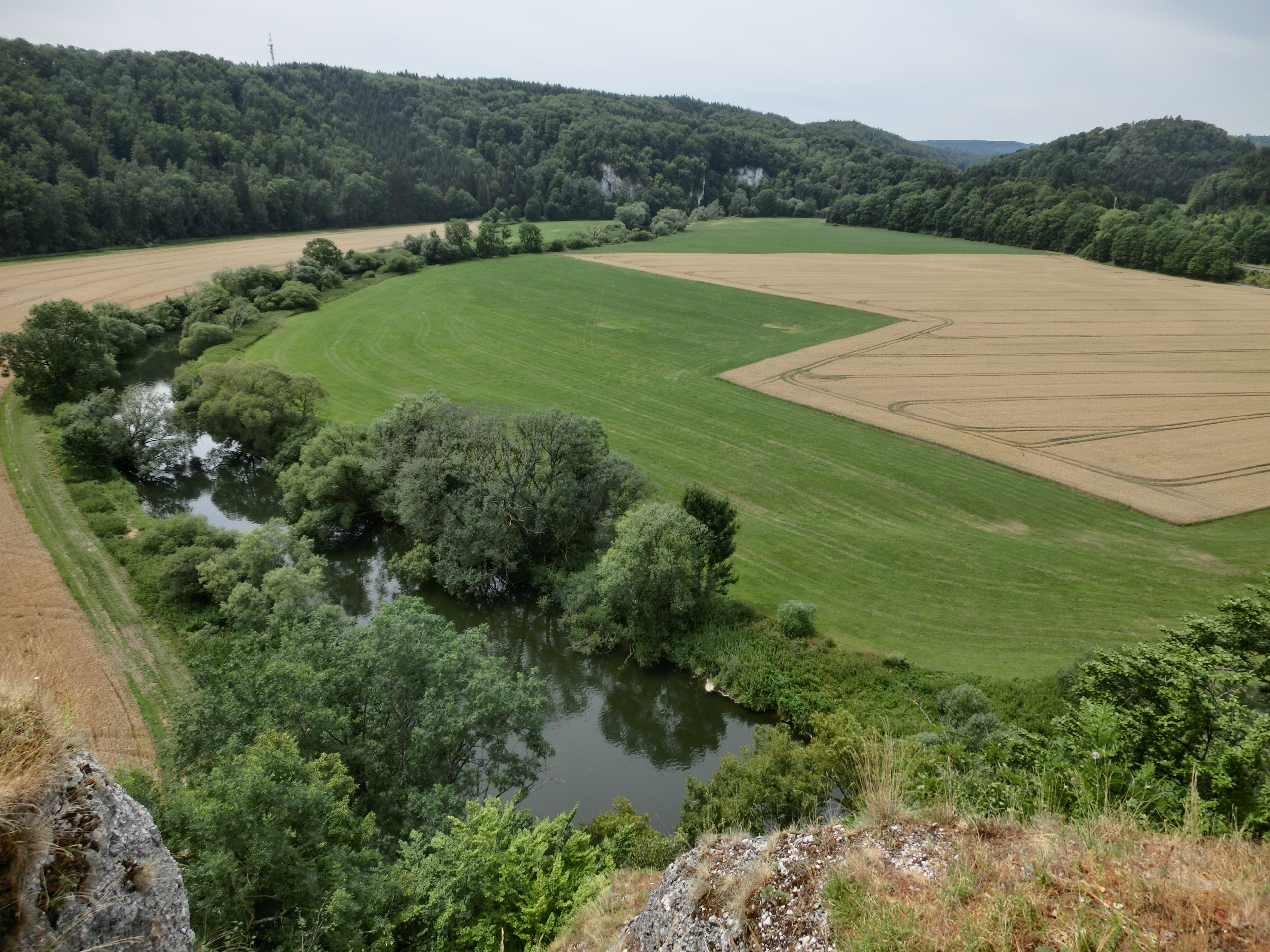 Deutschland (D) - Baden-Württemberg (BW) - Landkreis Sigmaringen (SIG) - Inzigkofen: Blick ins Donautal